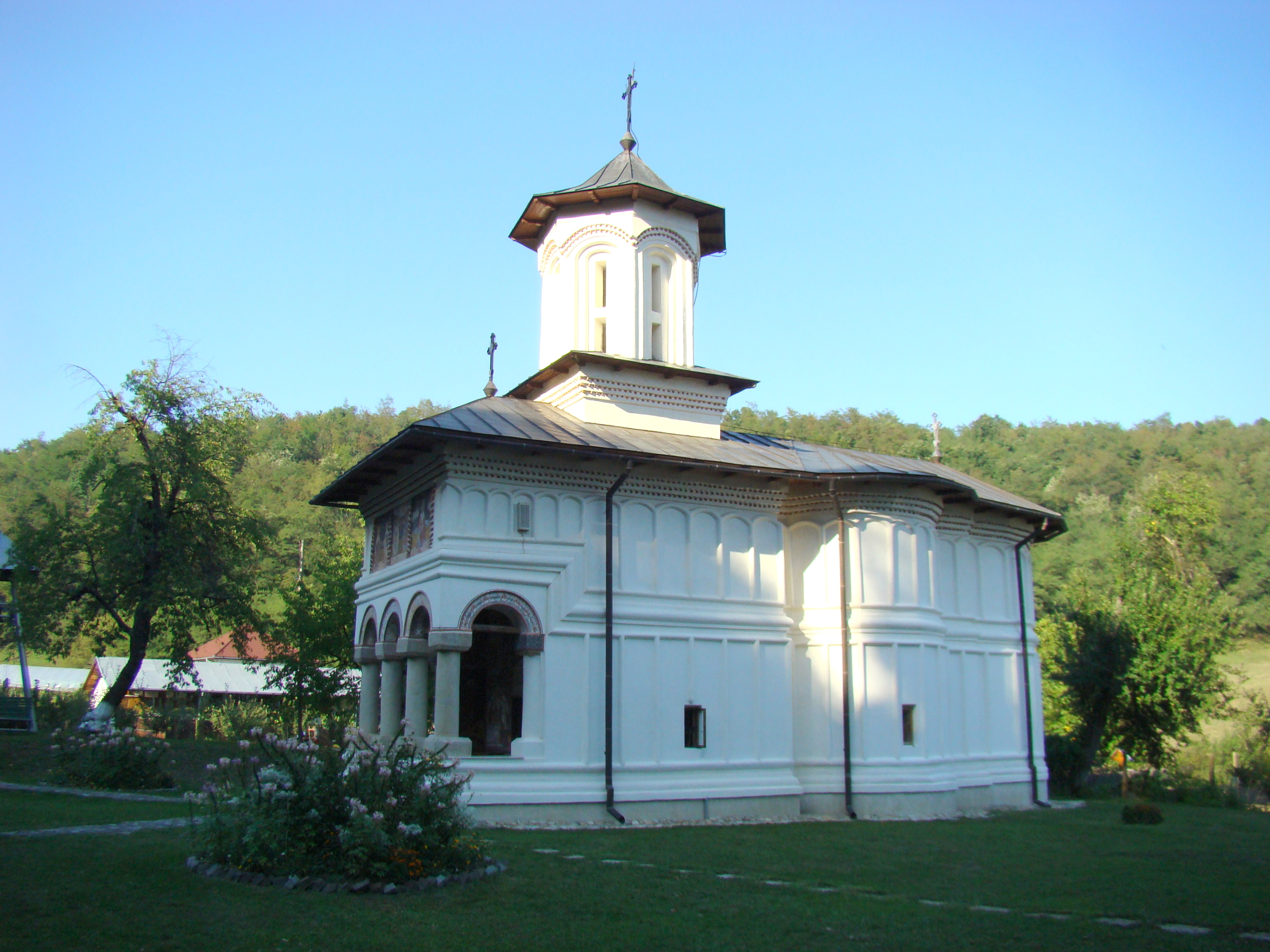 Biserica „Sfinţii Ioachim și Ana”, sat Târgu Logrești; comuna Logrești 01